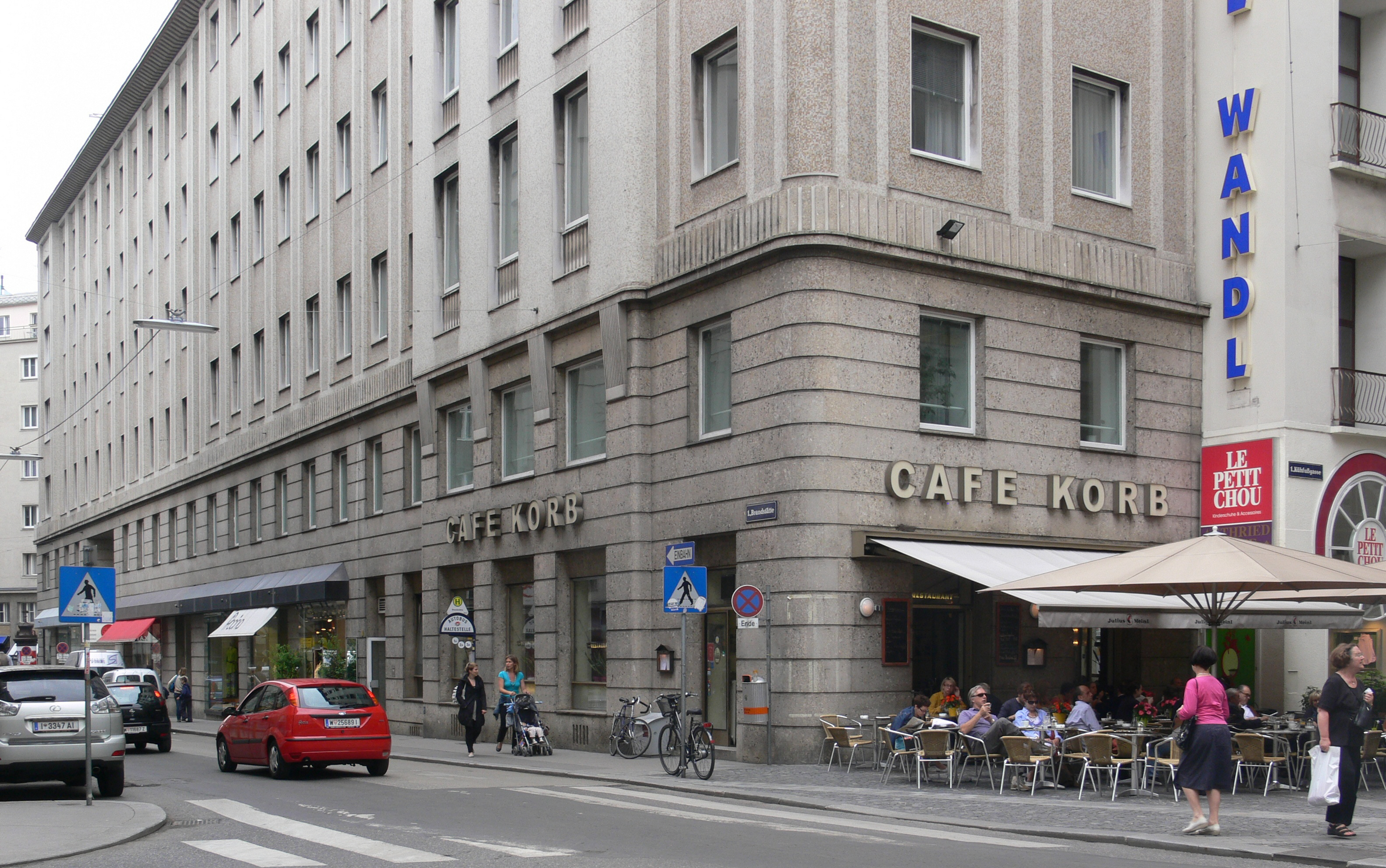 Café Korb Wien, 1. Bezirk (Innere Stadt), Brandstätte 9